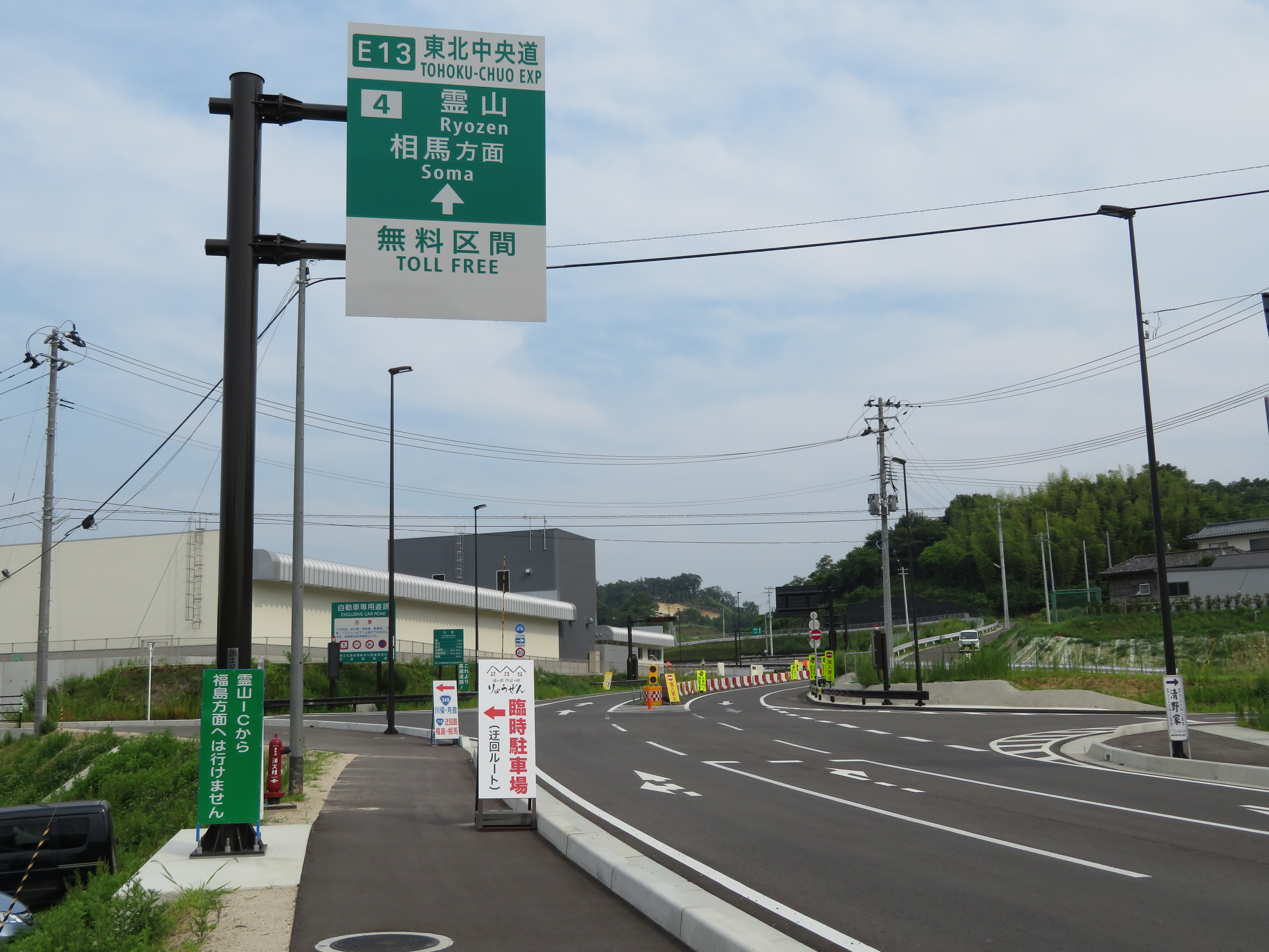 東北中央自動車道（相馬福島道路）霊山ＩＣ入口付近 Canon PowerShot SX720 HS